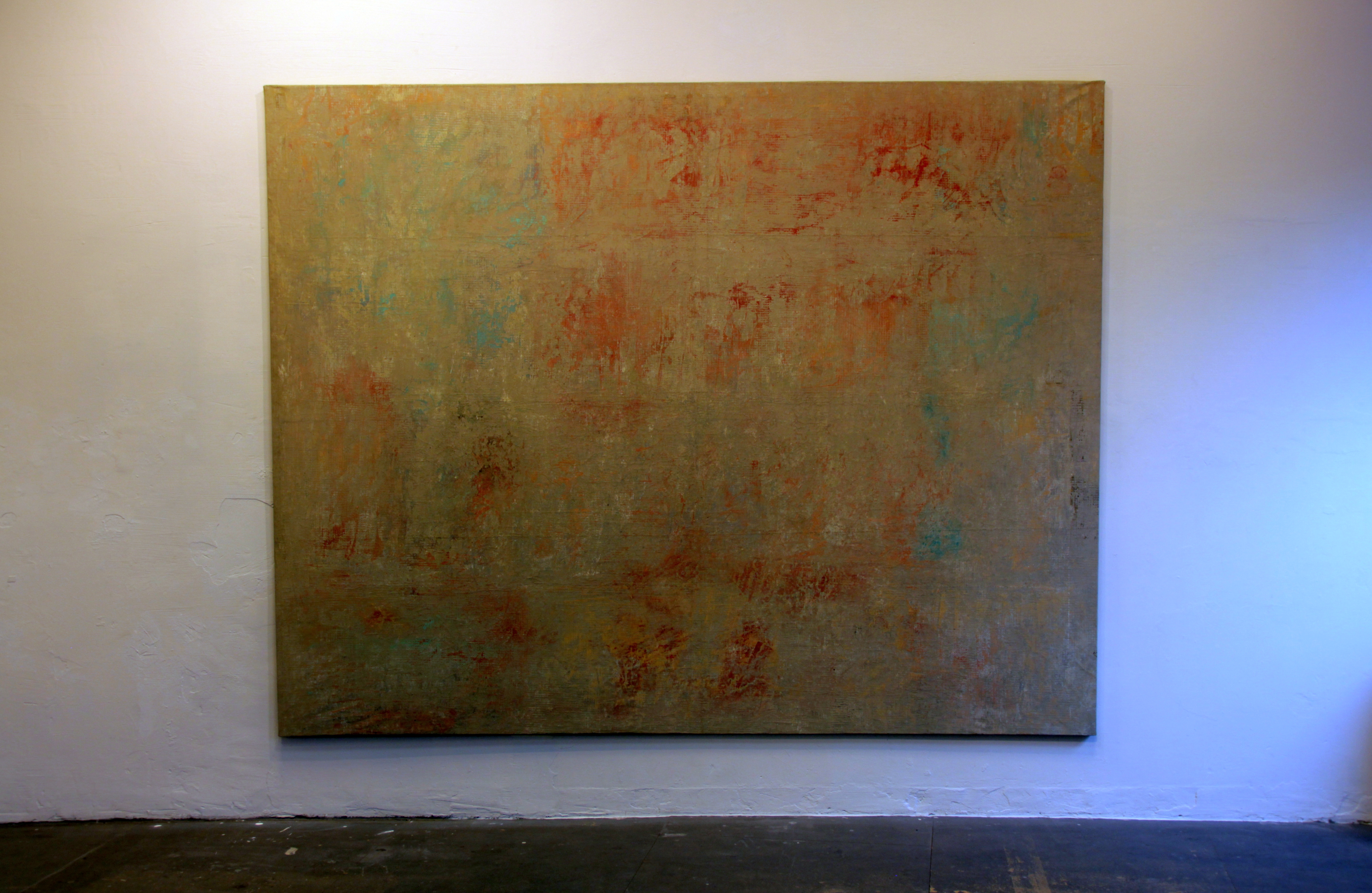 Malerei von Lilli Engel. Fotografie Jakobine Engel.